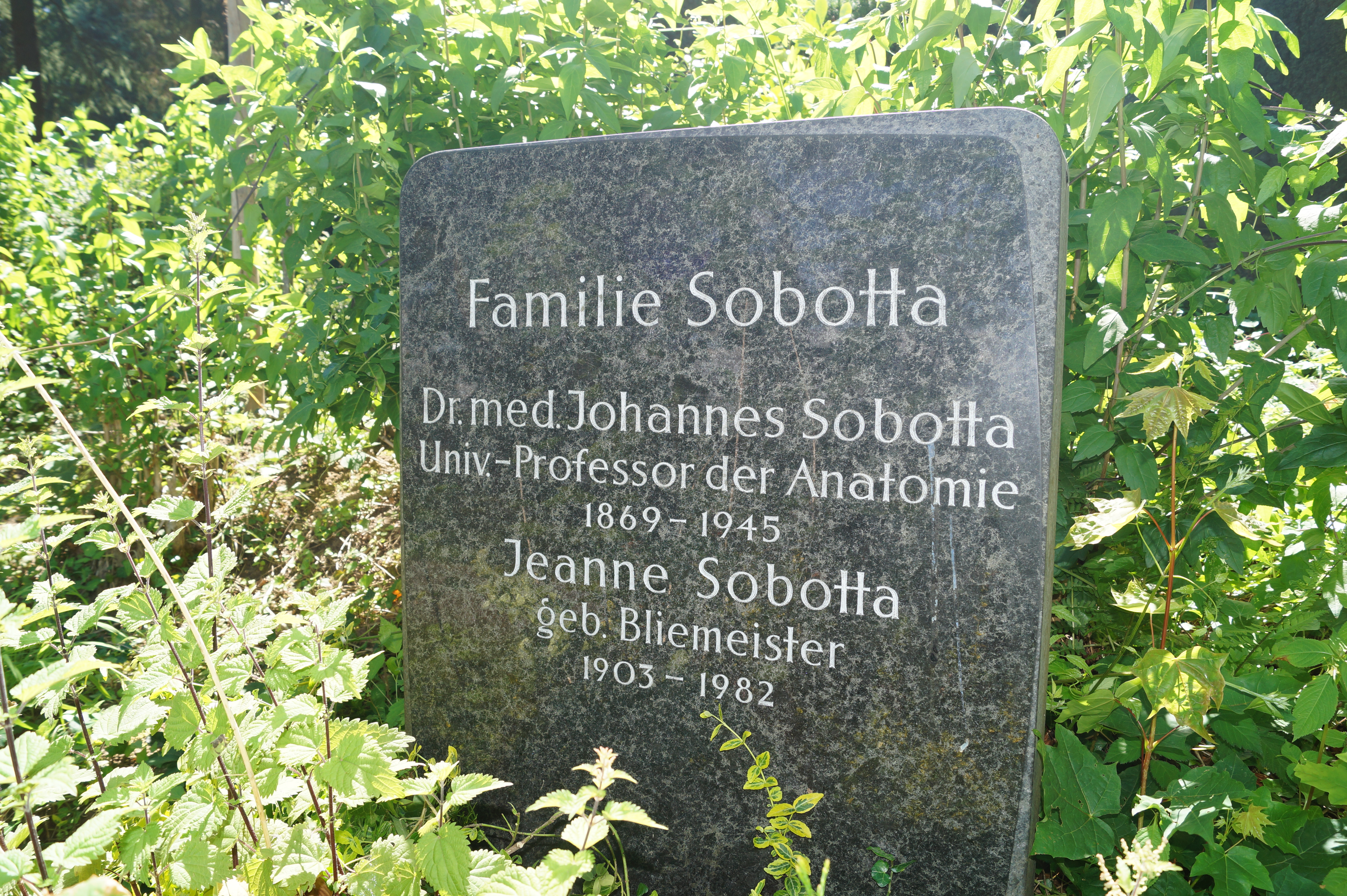 Grabstein von Johannes Sobotta auf dem Poppelsdorfer Friedhof (Abteilung XXVIII).